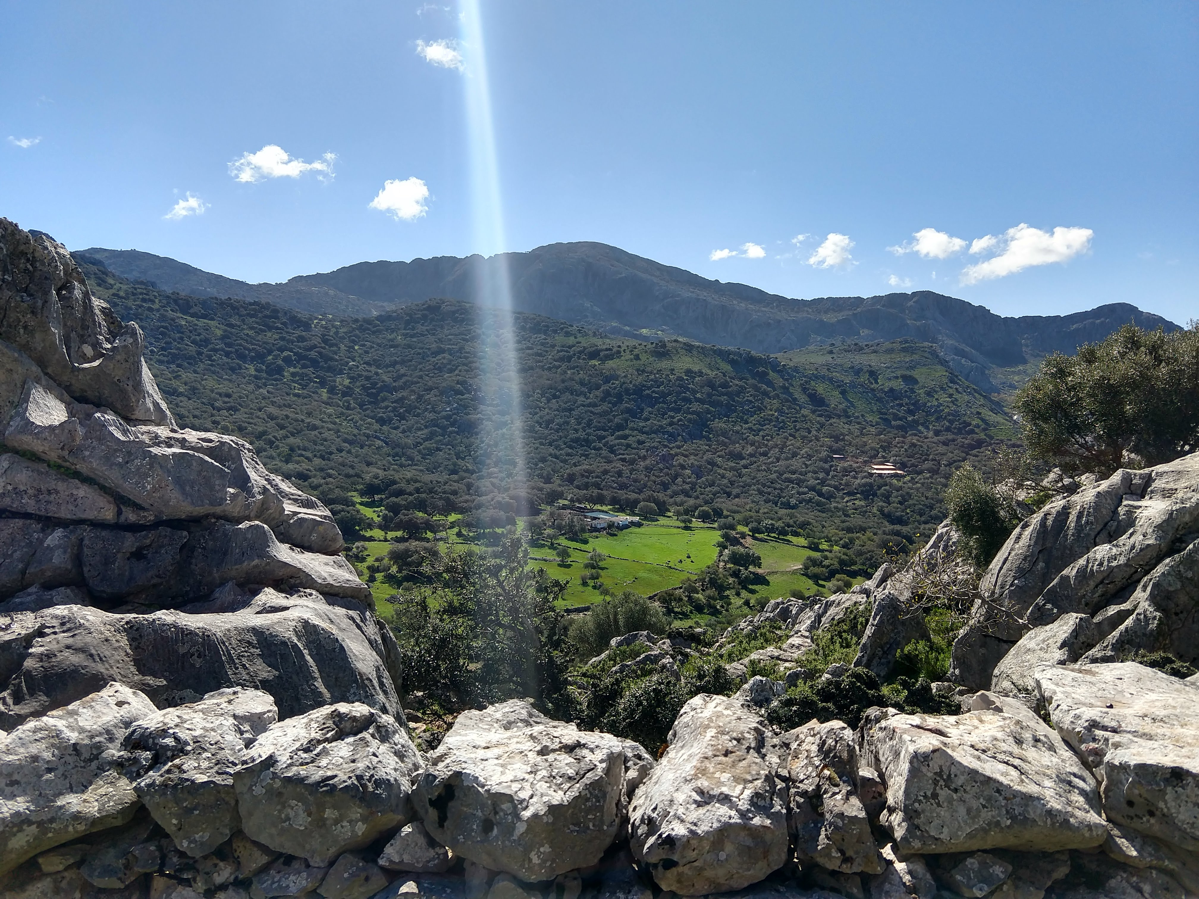 Imagen del mazizo de la Sierra del Caillo y de su máxima altitud, el Pico Navazo Alto, desde las inmediaciones del Salto del Cabrero (Benaocaz) en la Sierra de Grazalema en abril de 2018.